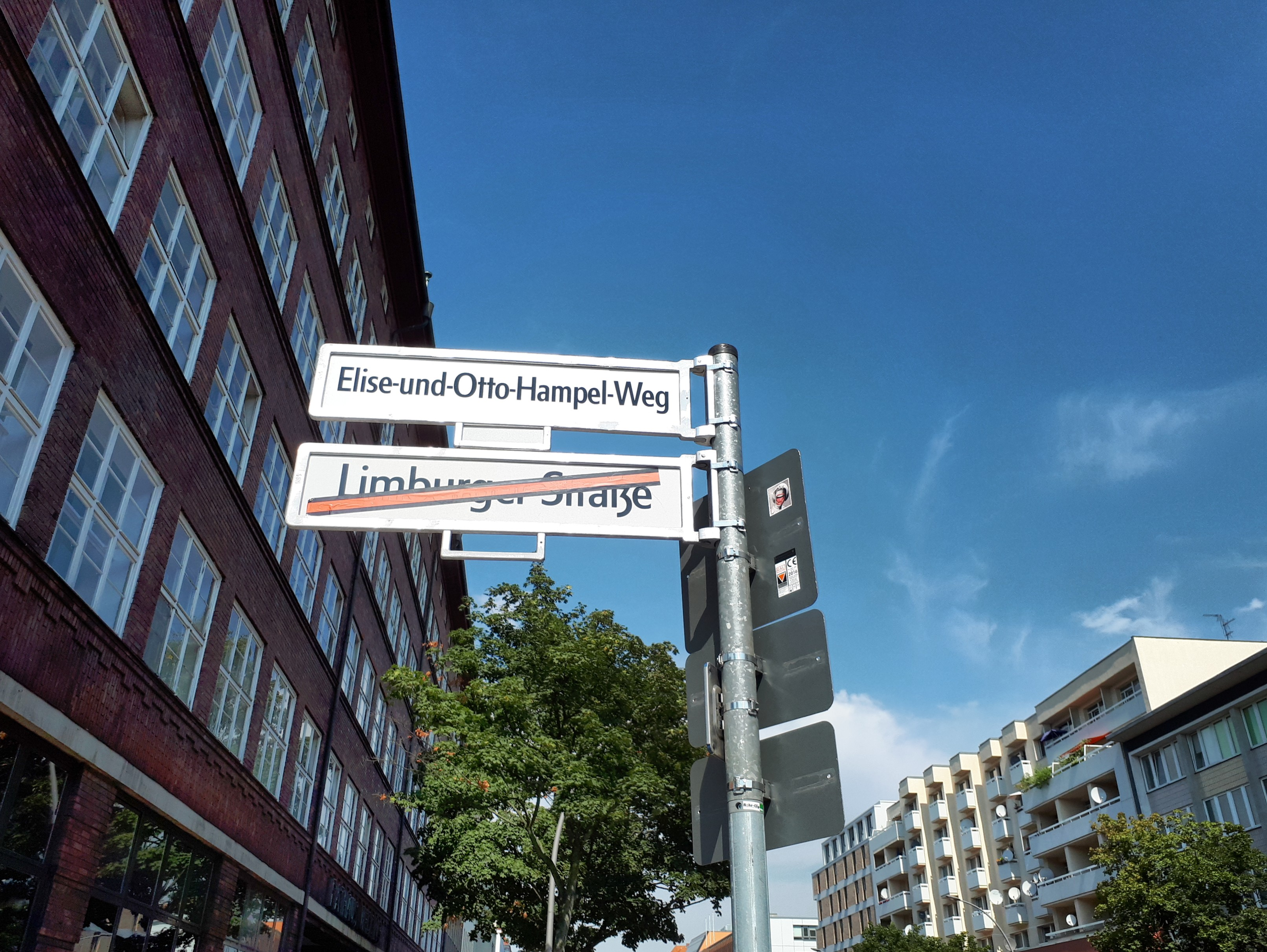 Wedding Elise-und-Otto-Hampel-Weg Straßenschild